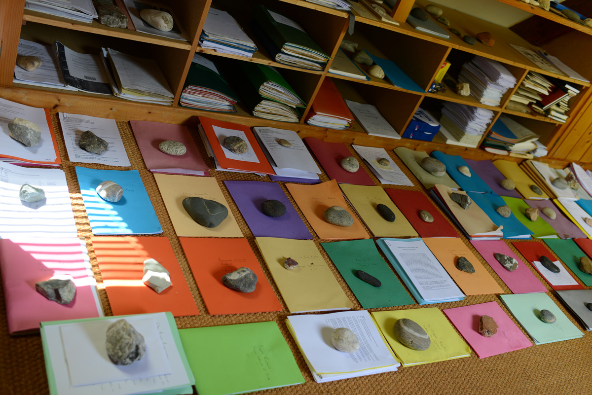 Laurent Brunet / Revue Lisières, Vue de l’Atelier atlantique de Kenneth White à Trébeurden, 2014